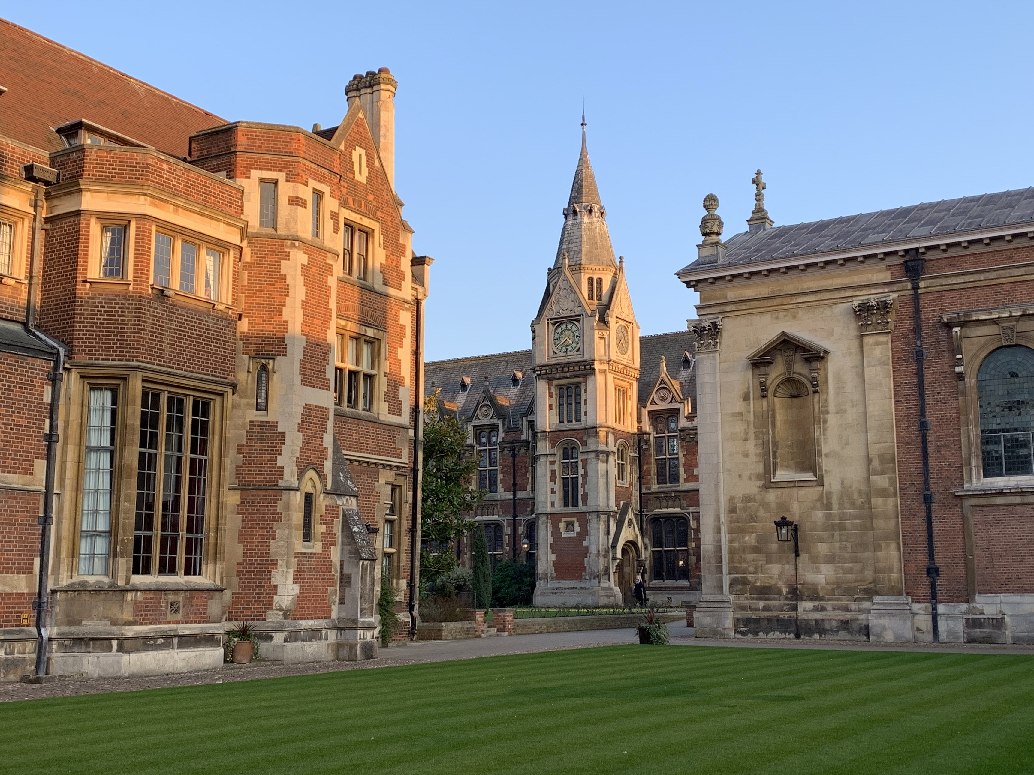 Der Uhrturm des Colleges